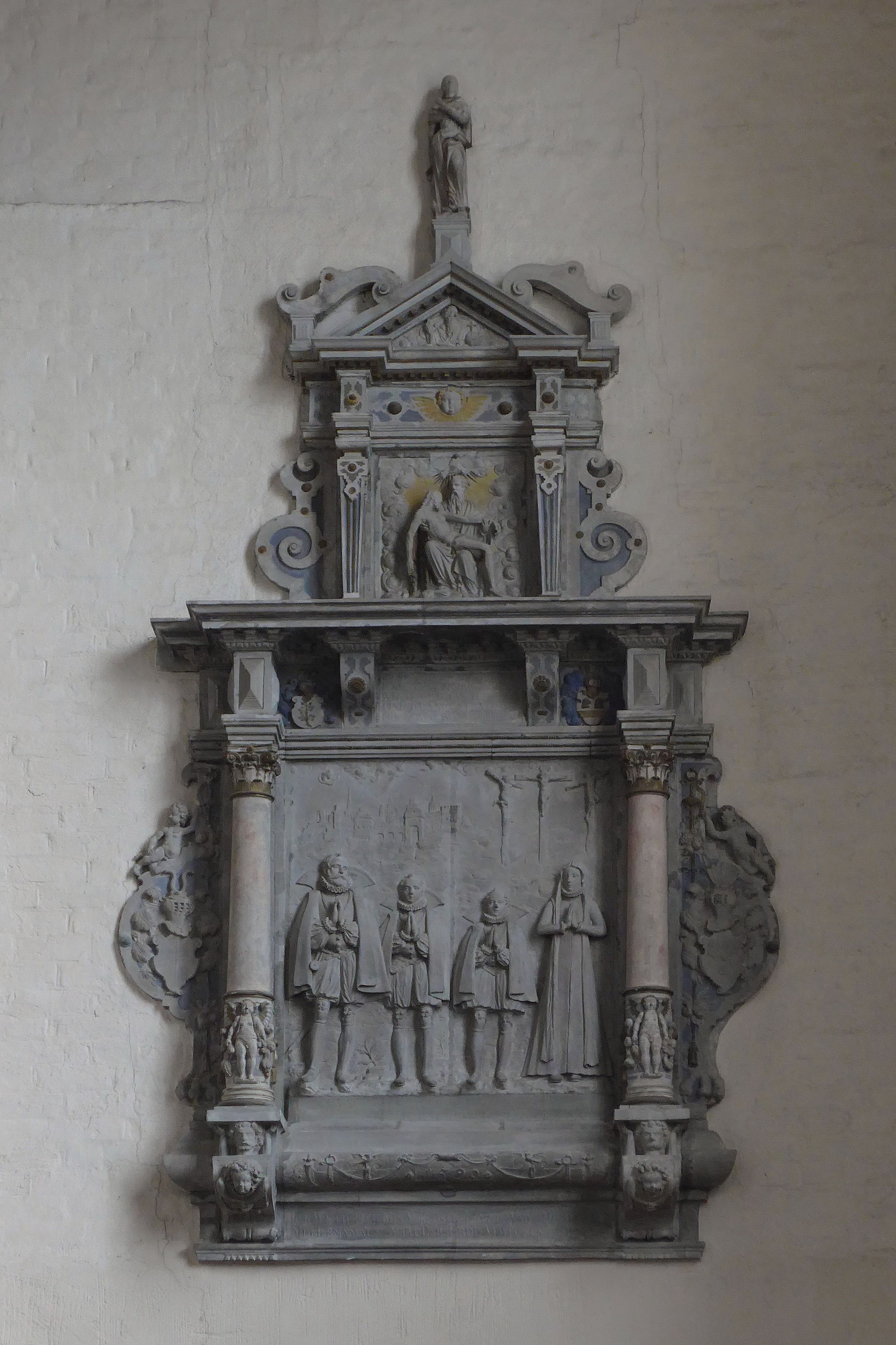 Epitaph der Familie Rantzau in der Stadtkirche Neustadt in Holstein